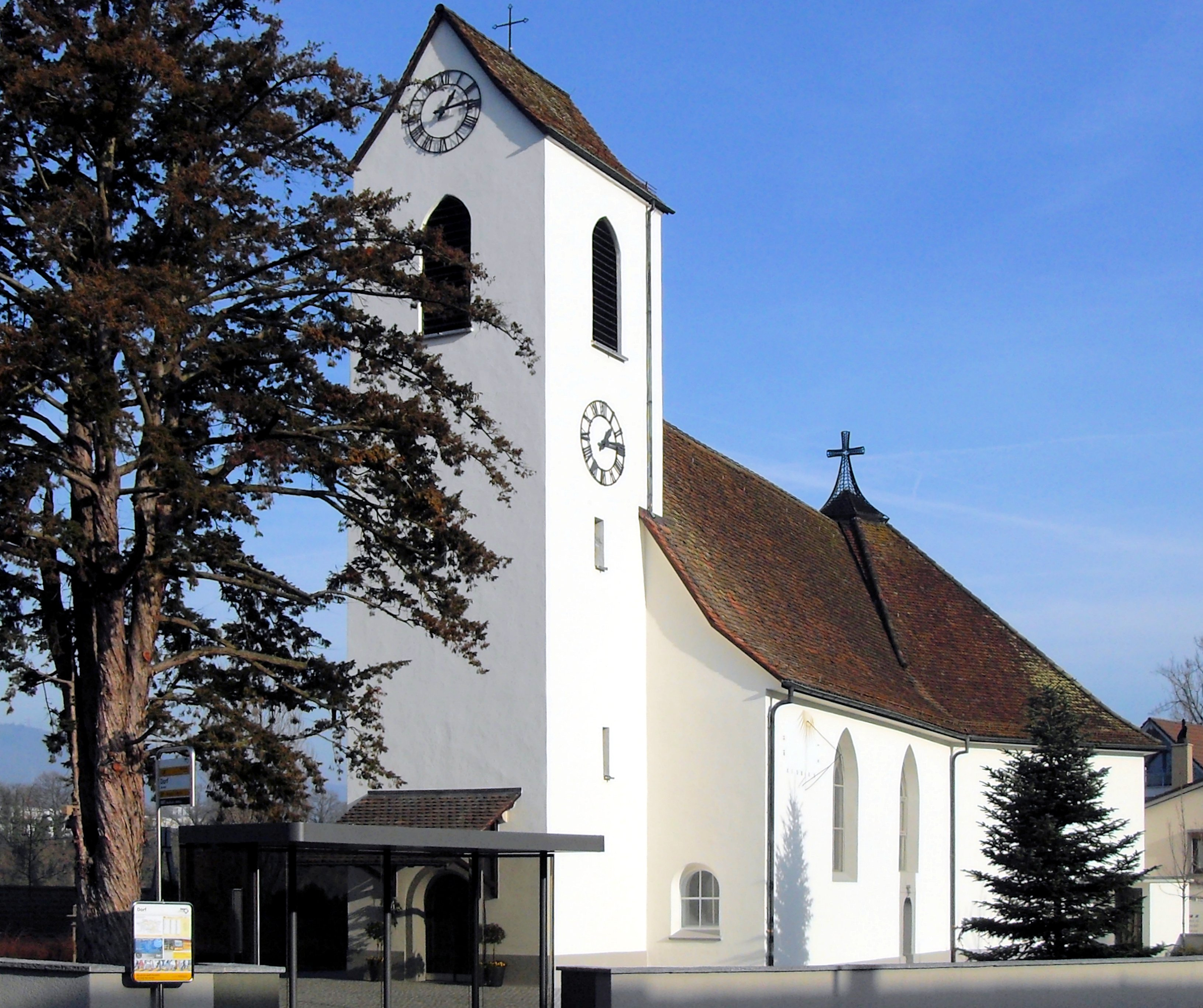 Pfarrkirche St. Martin in Mumpf, Kanton Aargau, Schweiz